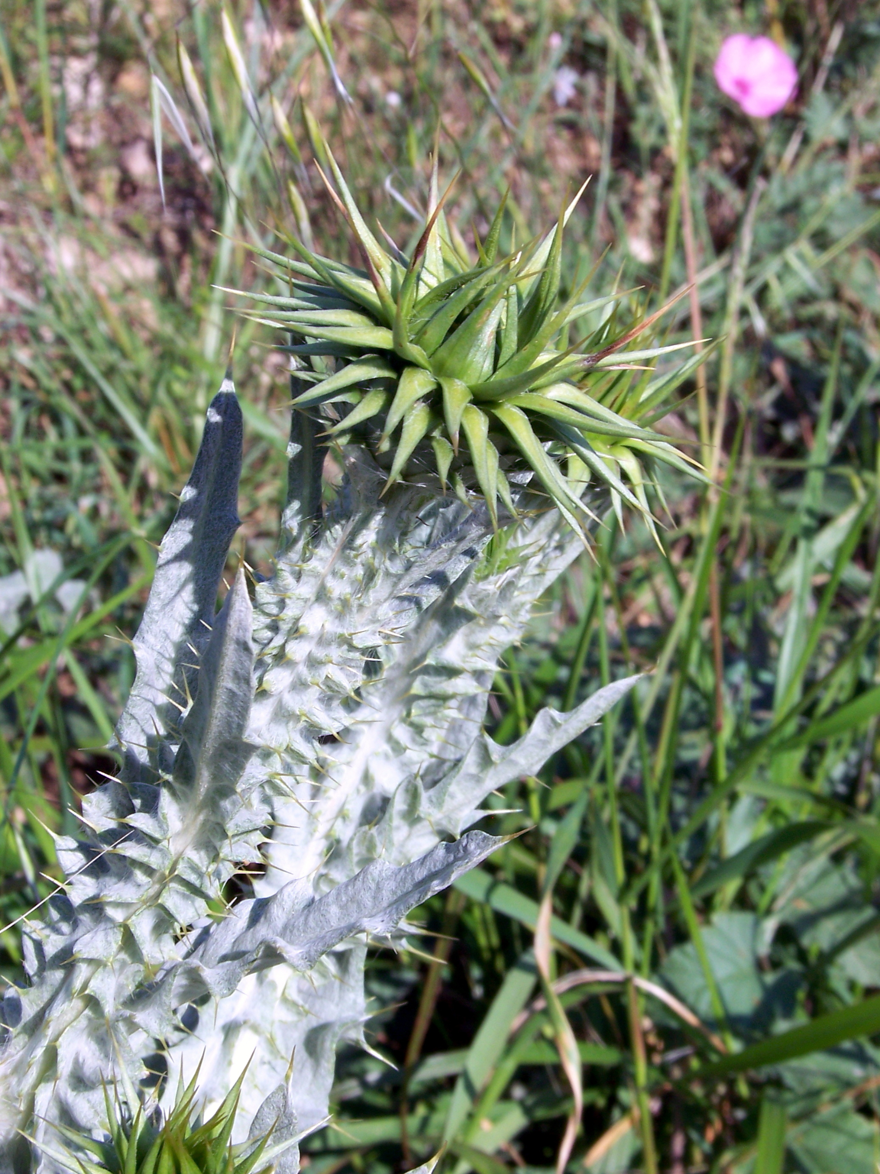 Onopordum macracanthum (cardo borriquero) - Capítulo joven en pre-antresis - Camino del Derramador de La Algüeda, Albatera (Alicante, España).